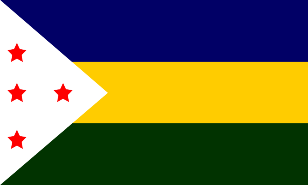 Bandera Oficial del Cantón de Abangares, Guanacaste, Costa Rica.